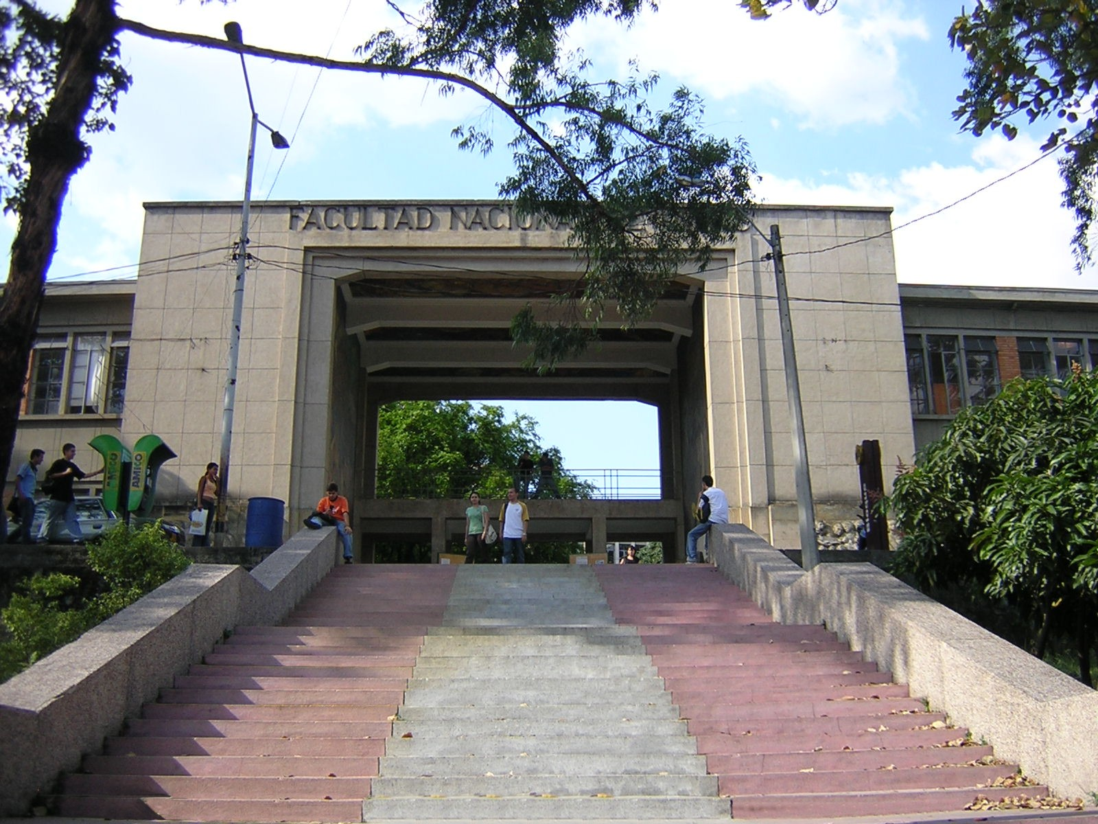 bloque M3, Facultad de Minas, Universidad Nacional de Colombia sede Medellín. Colombia